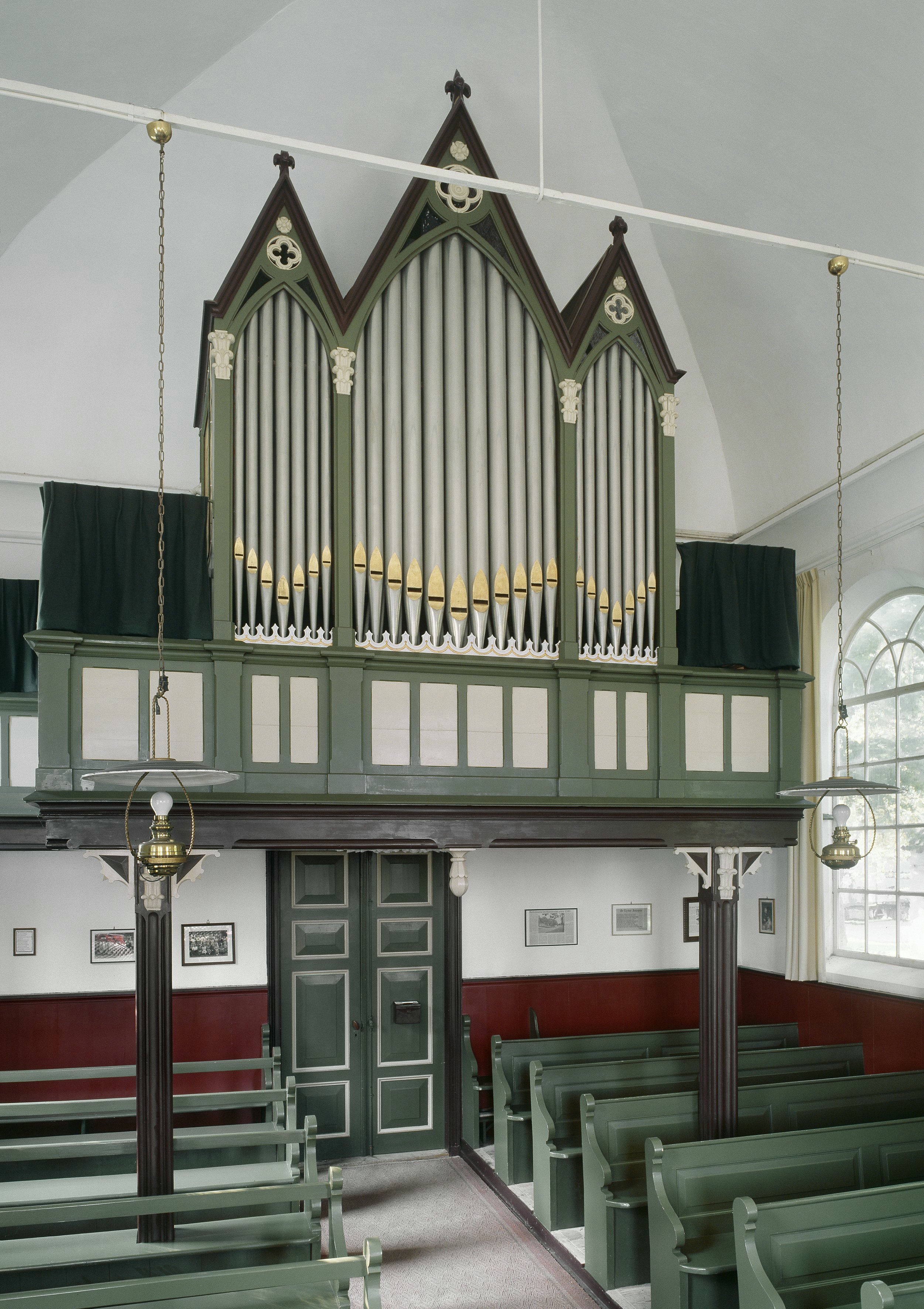 Nederlands Hervormde Kerk: Interieur, aanzicht orgel, orgelnummer 678 (opmerking: Gefotografeerd voor Het Historische Orgel in Nederland 1886-1894, bladzijde 26)